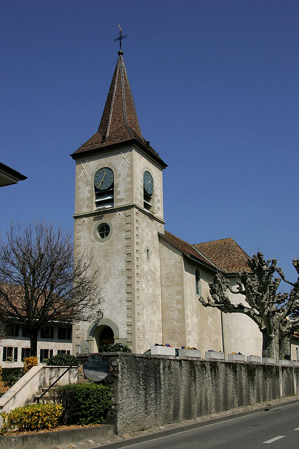 Kirche in Collonge